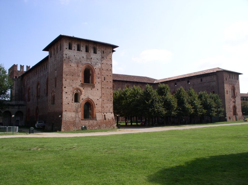 Autore: Sandro Bodei. Maschio del castello di Vigevano, veduta dal cortile interno.